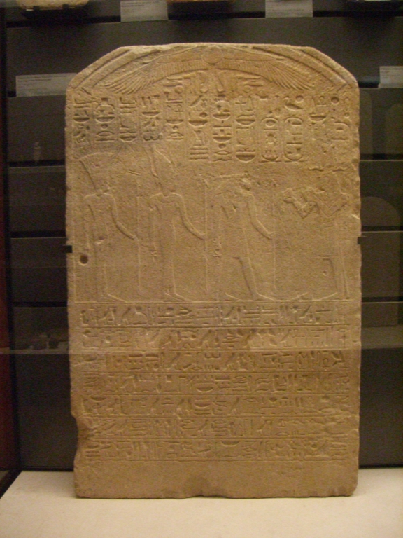 Stèle d'Amenhotep II le figurant en offrande devant les dieux d'Eléphantine. Trouvée à Amara en Nubie - XVIIIe dynastie égyptienne - Musée du Louvre